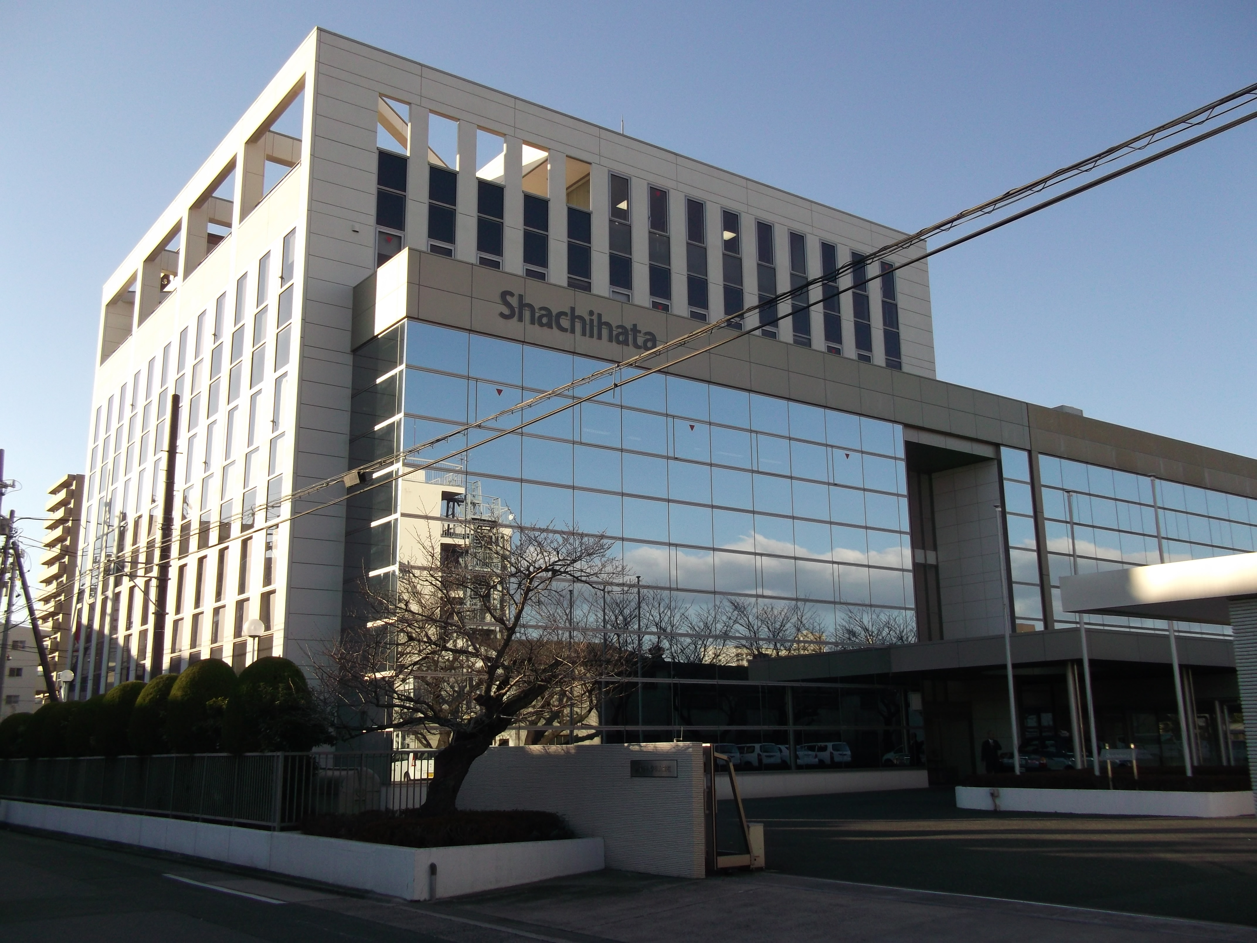 名古屋市西区天塚町にあるシヤチハタ本社を南東側から写す